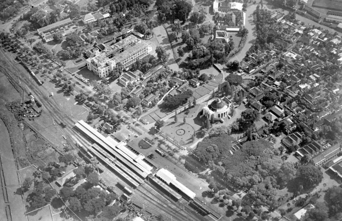 Repronegatief. Batavia Koningsplein met station